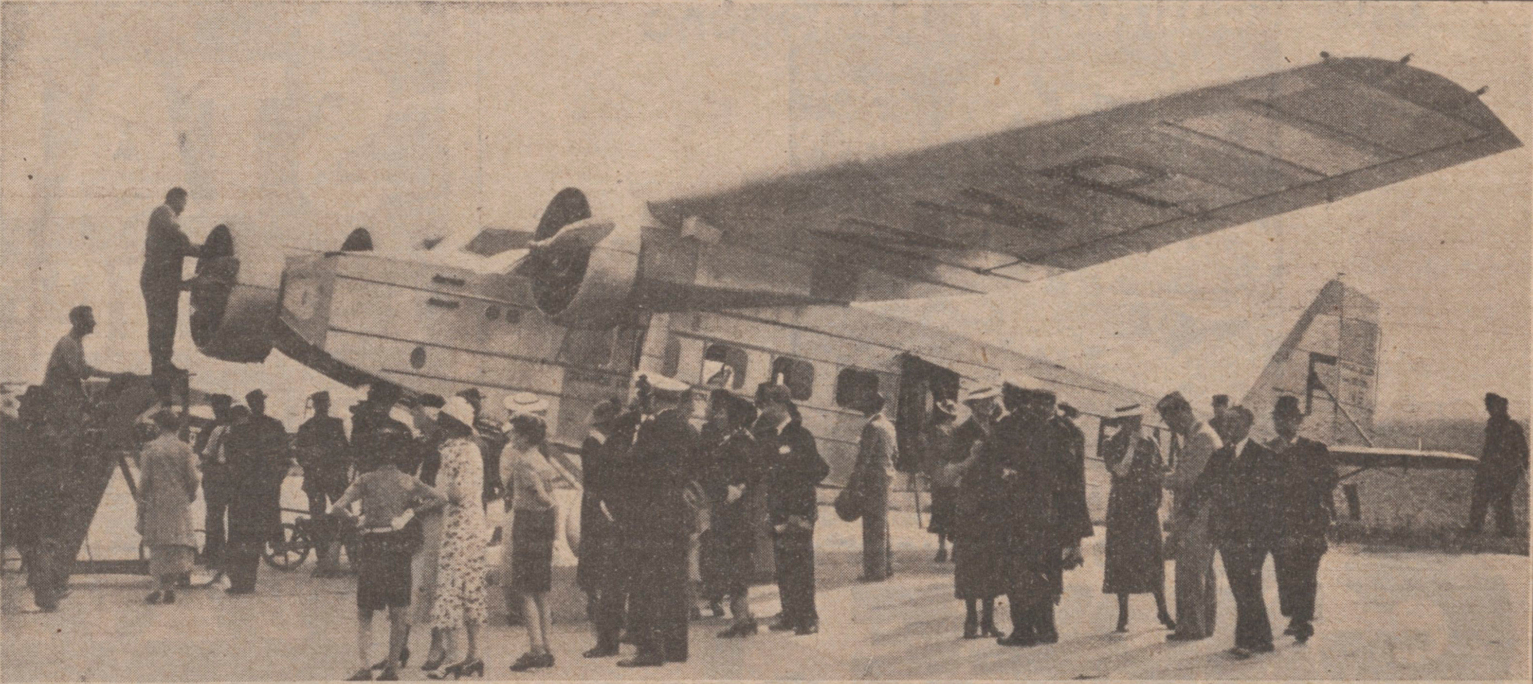 A bord de la « Ville de Tananarive », le trimoteur Marcel Bloch 120, qui est représenté ici au moment de son baptême, René Lefèvre gagne Madagascar. Cet avion est destiné, en effet, au service de la ligne Tananarive-Broken Hill. Lefèvre est parti, le 19 juillet, à 9 h. 10 du Bourget, pour arriver à Alger le même jour, à 18 heures, après avoir fait escale à Marseille, de 12 h. 20 à 14 h. 30. Il est reparti le 20, à 7 h. 50, de conserve avec le trimoteur de la Régie Air-Afrique. Il avait à son bord le Général Féquant, Inspecteur des Forces d'Outre-Mer. Il est arrivé à Alouef dans la soirée. Lefèvre forme équipe avec le radio Barbier.